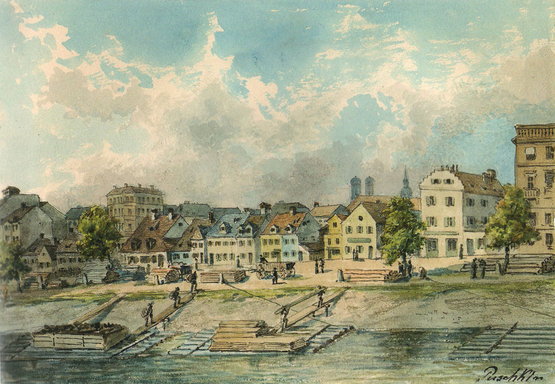 Die »Obere Länd«